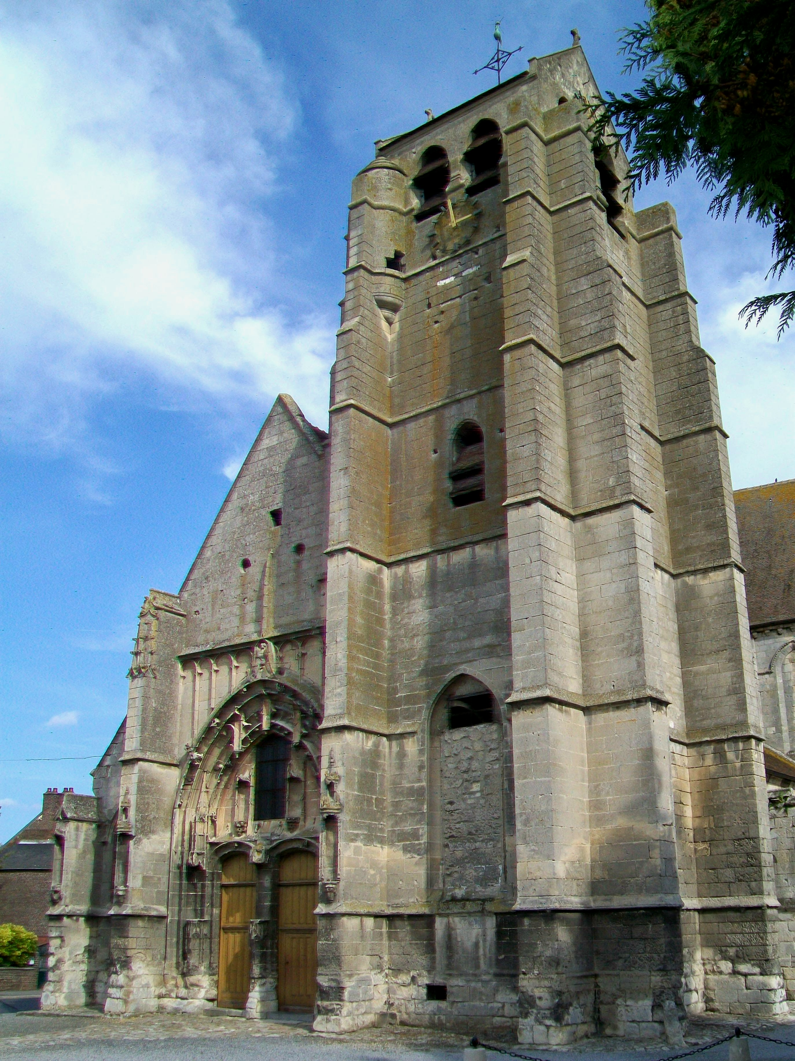 L'église Saint-Pierre-et-Saint-Paul, clocher et façade ouest.